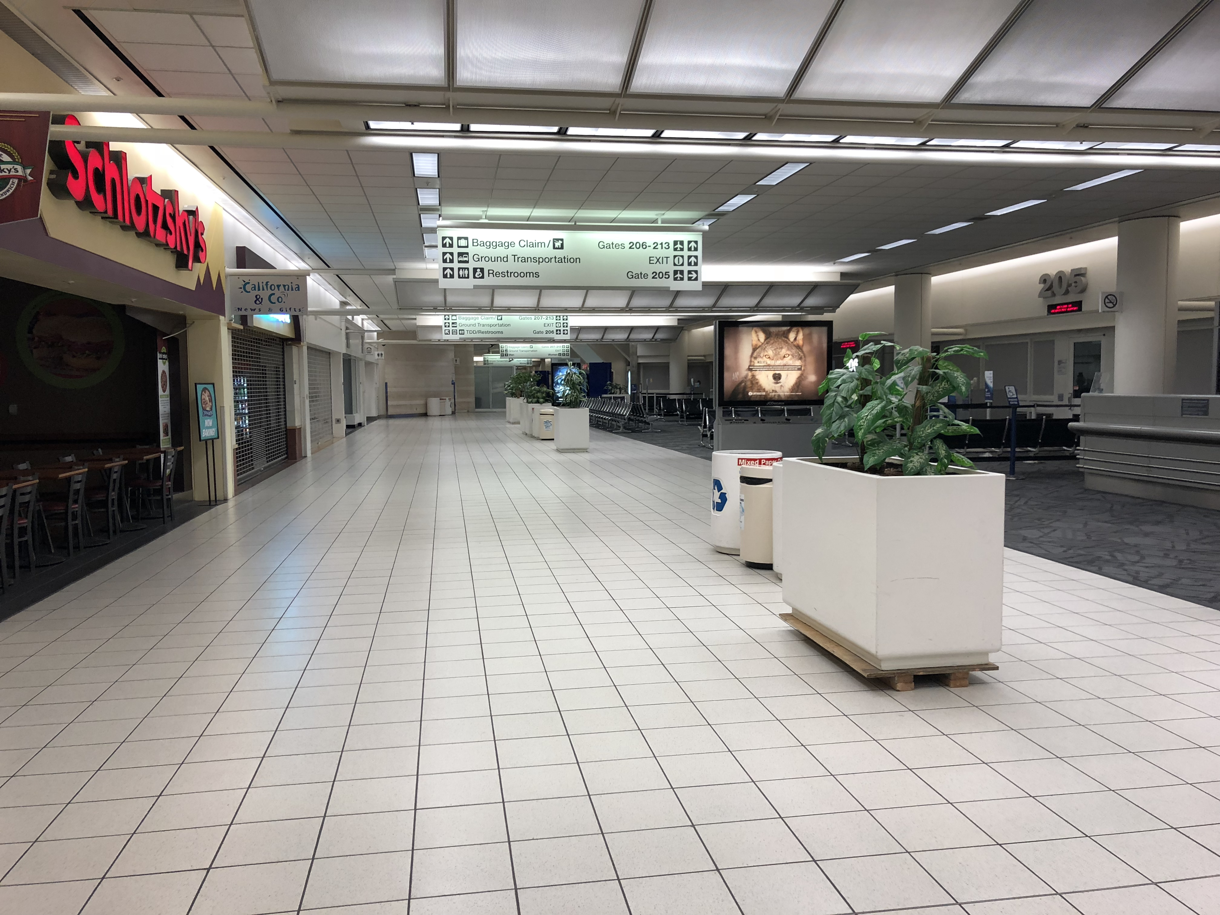 Terminal 2 del Aeropuerto Internacional de Ontario.